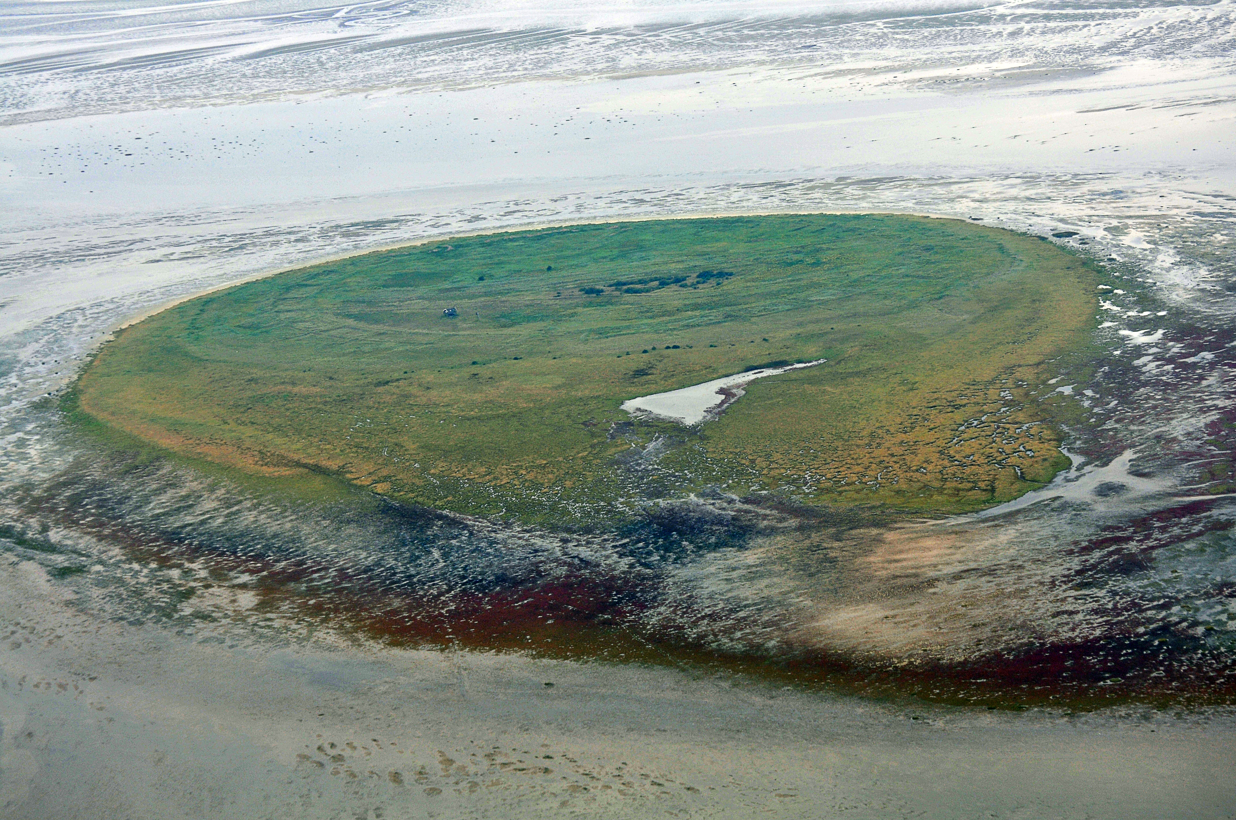 Fotoflug Nordsee, Nigehörn